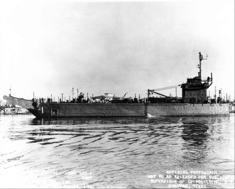 USS Gypsy (ARSD-1)